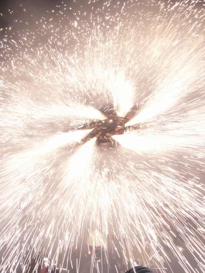 La girella del Cavallo di Fuoco. Autore : Mario Michettoni